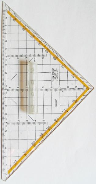 Geodreieck mit Gebrauchsspuren